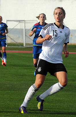 a_53_5093